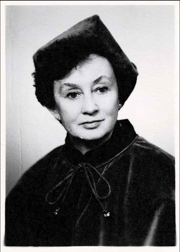 Jolenta Helena Schneider